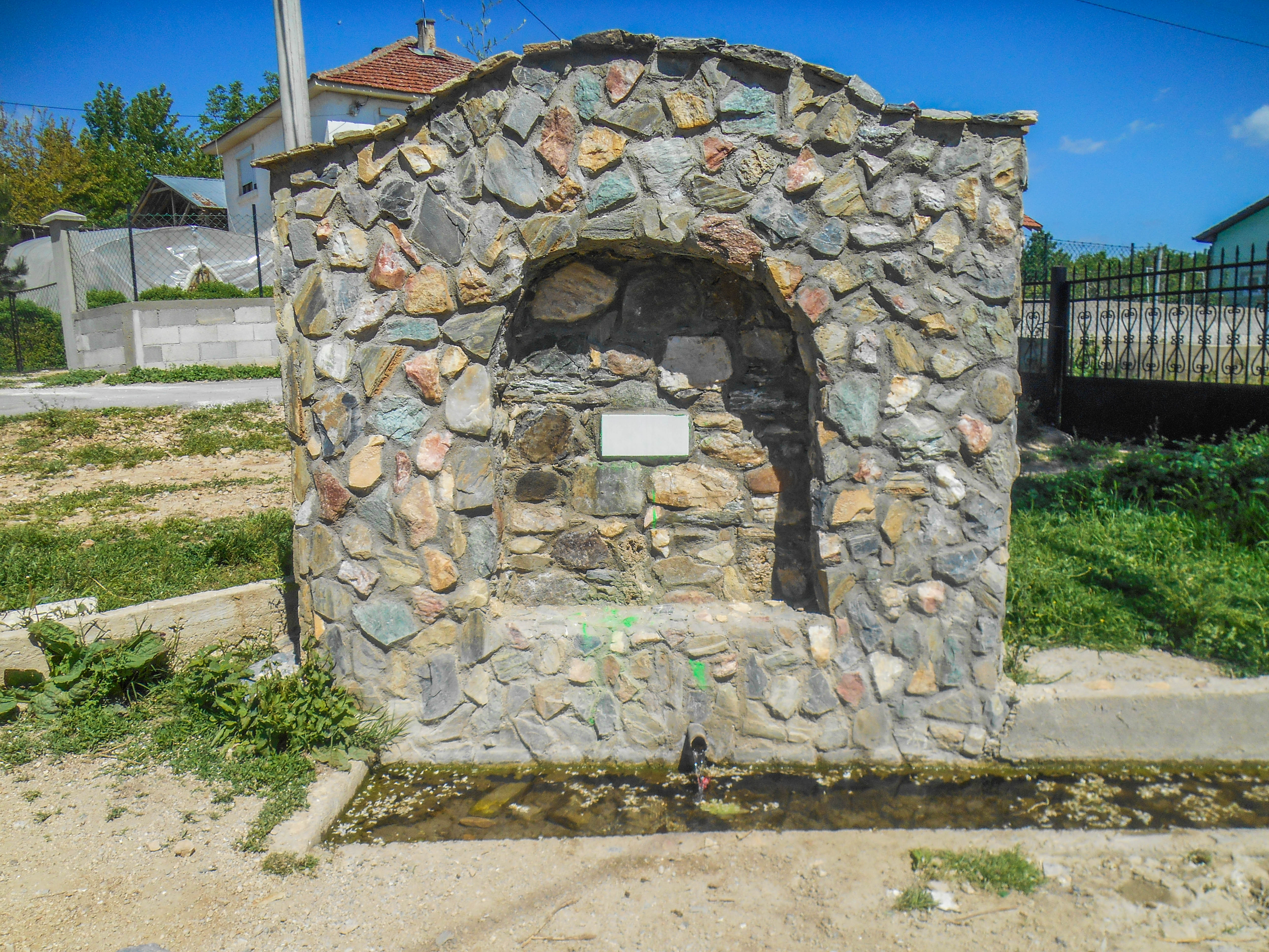 Селска чешма - Седларци